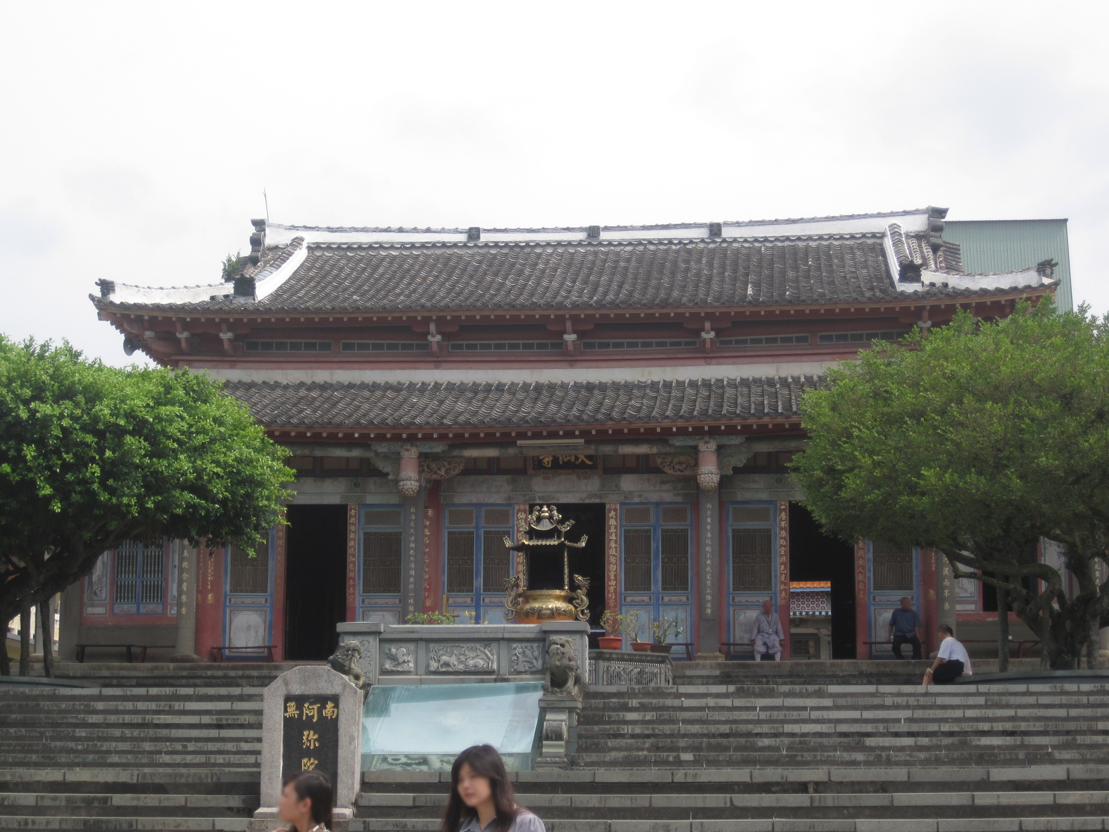 白河大仙寺正殿